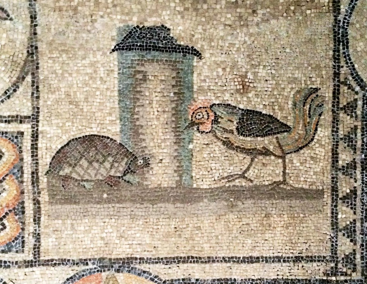 The Rooster and Tortoise in the South Room of Aquileia basilica